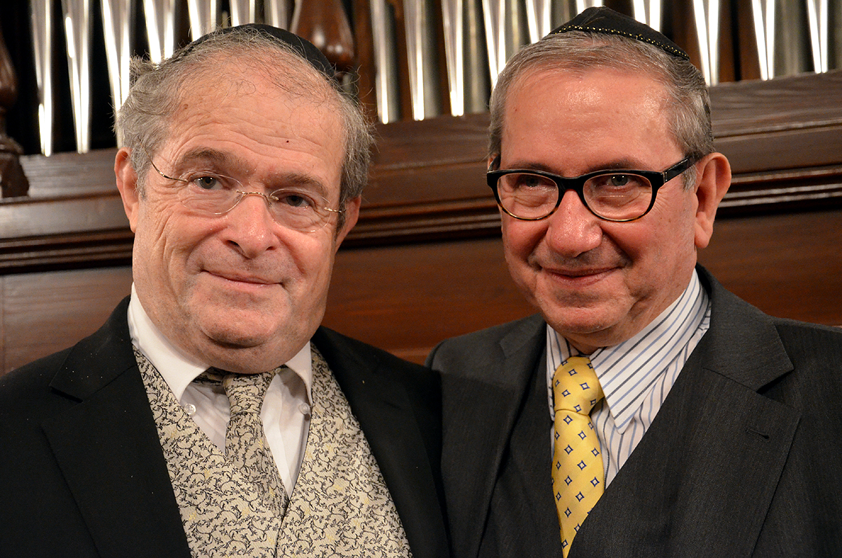 Elli Jaffe ("Kol Israel" - die Stimme Israels), Generalmusikdirektor der Großen Synagoge in Jerusalem, hier nach seinem ersten Konzert während der "Herbsttage der jüdischen Musik 2013" mit Professor Andor Izsák vor der Orgel im Großen Saal der Villa Seligmann in Hannover. ...